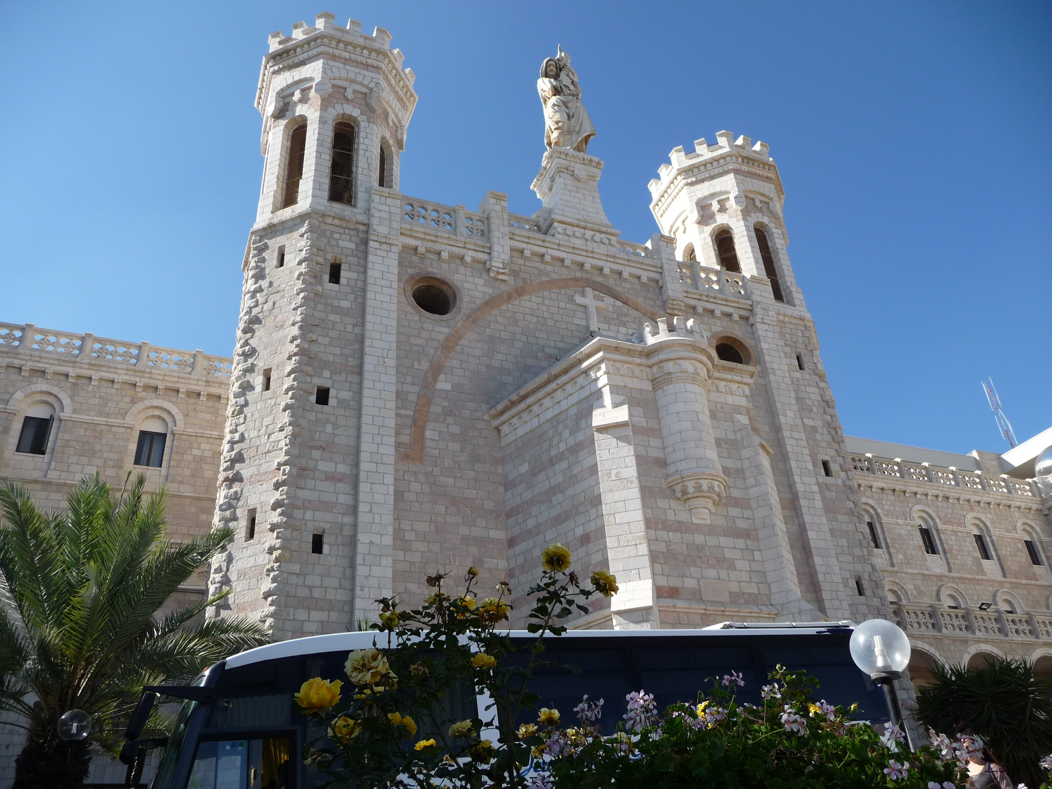 אכסניית נוטרדאם דה פרנס היא מבנה סמוך לכיכר צה"ל, שנבנה על ידי הרוזן הצרפתי מרי דה פְּייֶלָא, כחלק ממכלול מבנים ובהם בית חולים ושני מנזרים. שימש לאירוח צליינים, ומ-1970 שימש כמעונות סטודנטים. כיום משמש מלון, מנזר נוטרדאם דה ג'רוזלם. המבנה גבוה וסימטרי, וכולל קפלה במרכז ושני אגפים ממערב וממזרח. מעל הקפלה שני מגדלים בסגנון הבארוק, וביניהם פסל מריה אוחזת בישו התינוק.